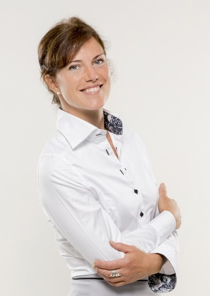 Chistine Ouellet en 2013